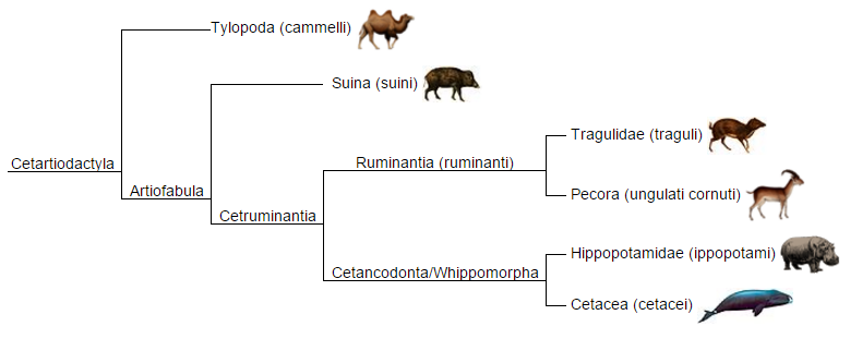 Phylogeny of Artiodactyla